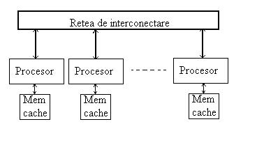 Arhitectura COMA (Cache-Only Memory Access)